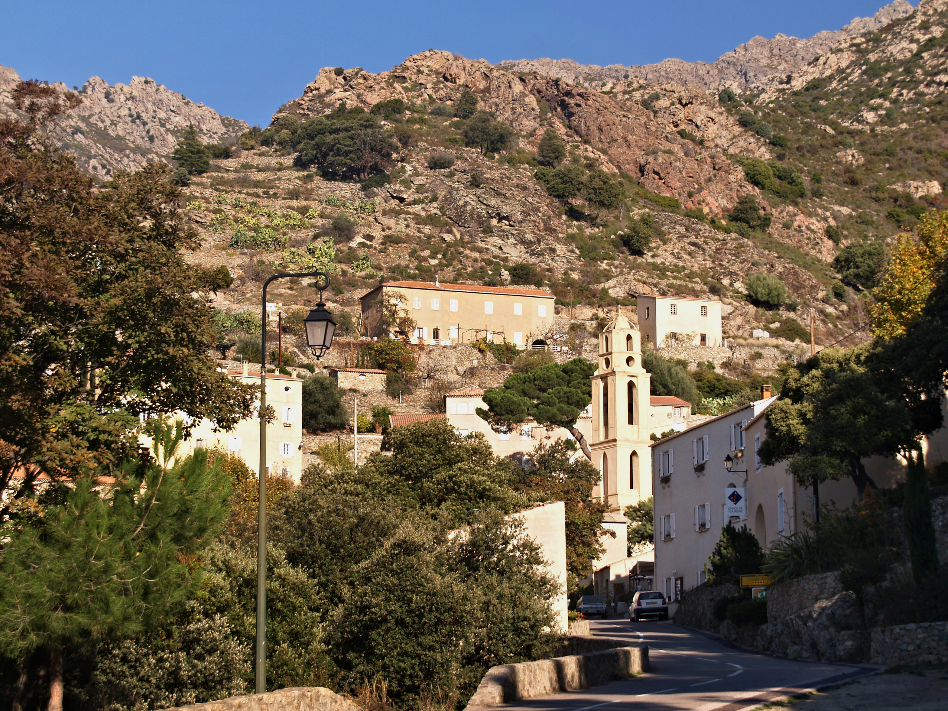 Lama (Corse) - Le cœur du village